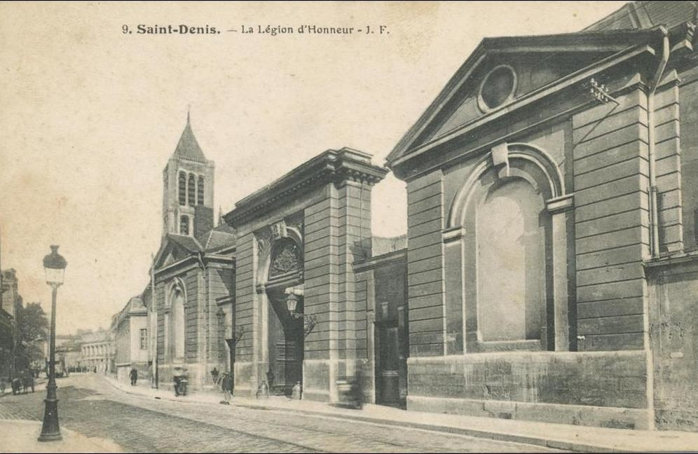 Saint-Denis.Rue de la Légion d'Honneur